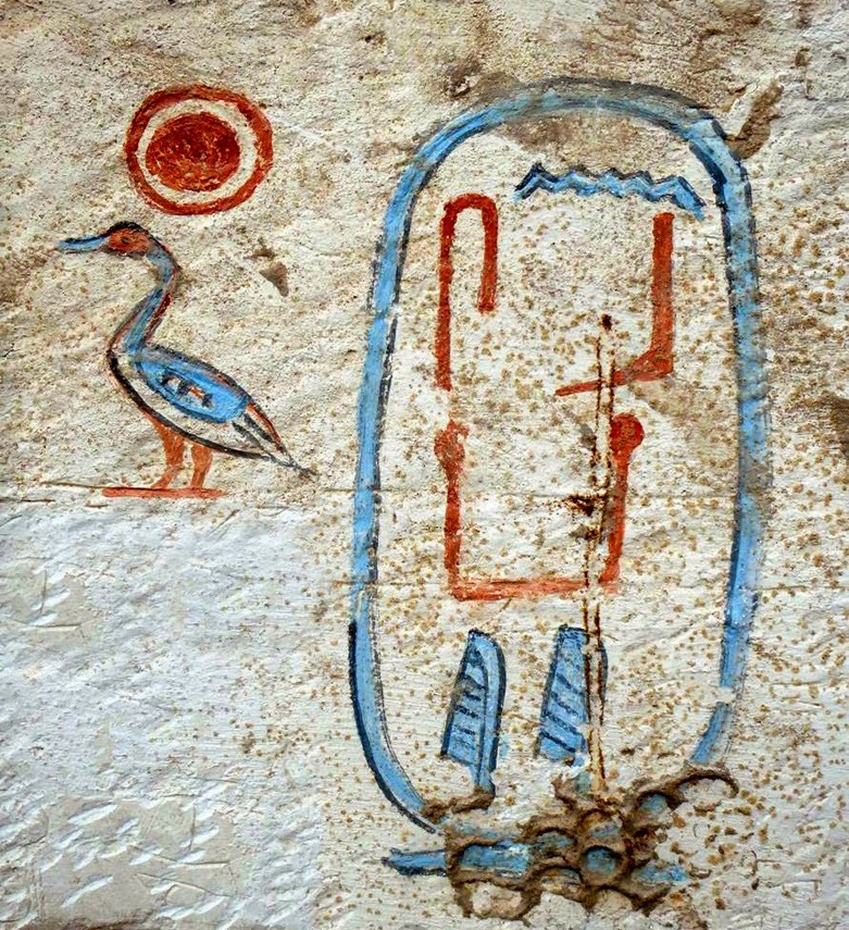 Картуш Сенебкая, фараона часоў Другога пераходнага перыяду (Абідаская дынастыя ці XVI), з яго грабніцы, знойдзенай каля Абідаса